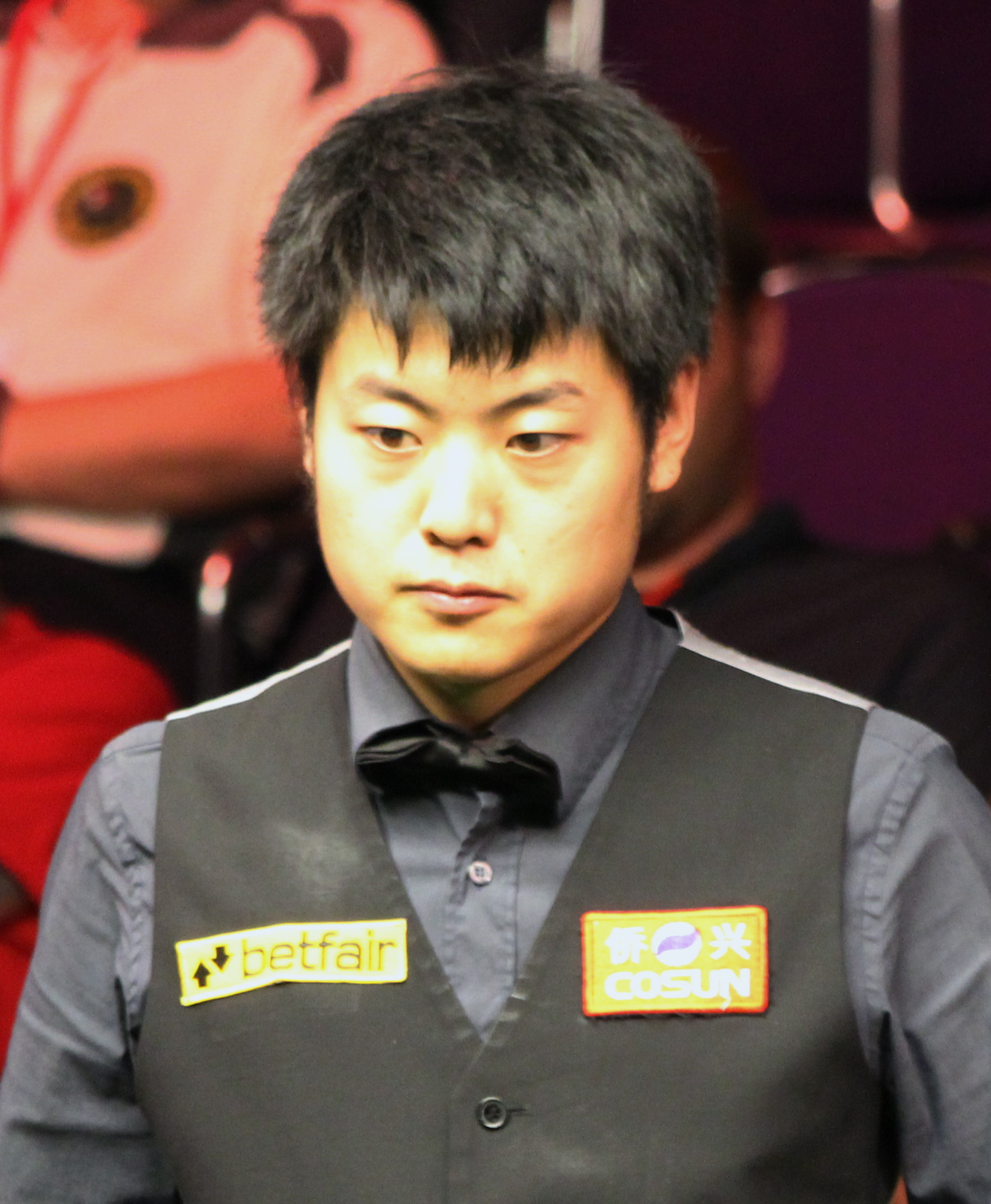 Liang Wenbo beim Paul Hunter Classic 2012